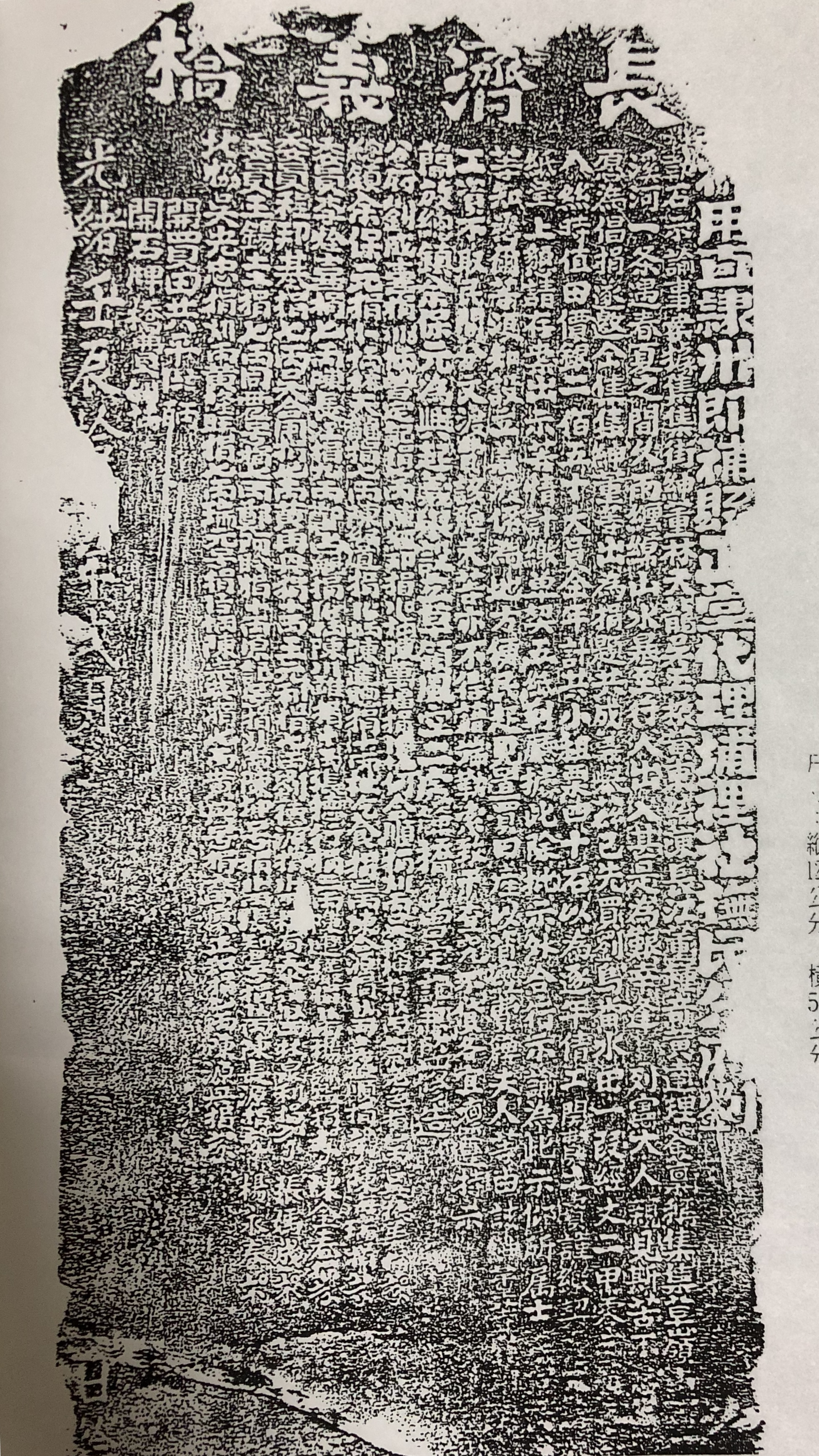 集集鎮長濟義橋碑(拓印)